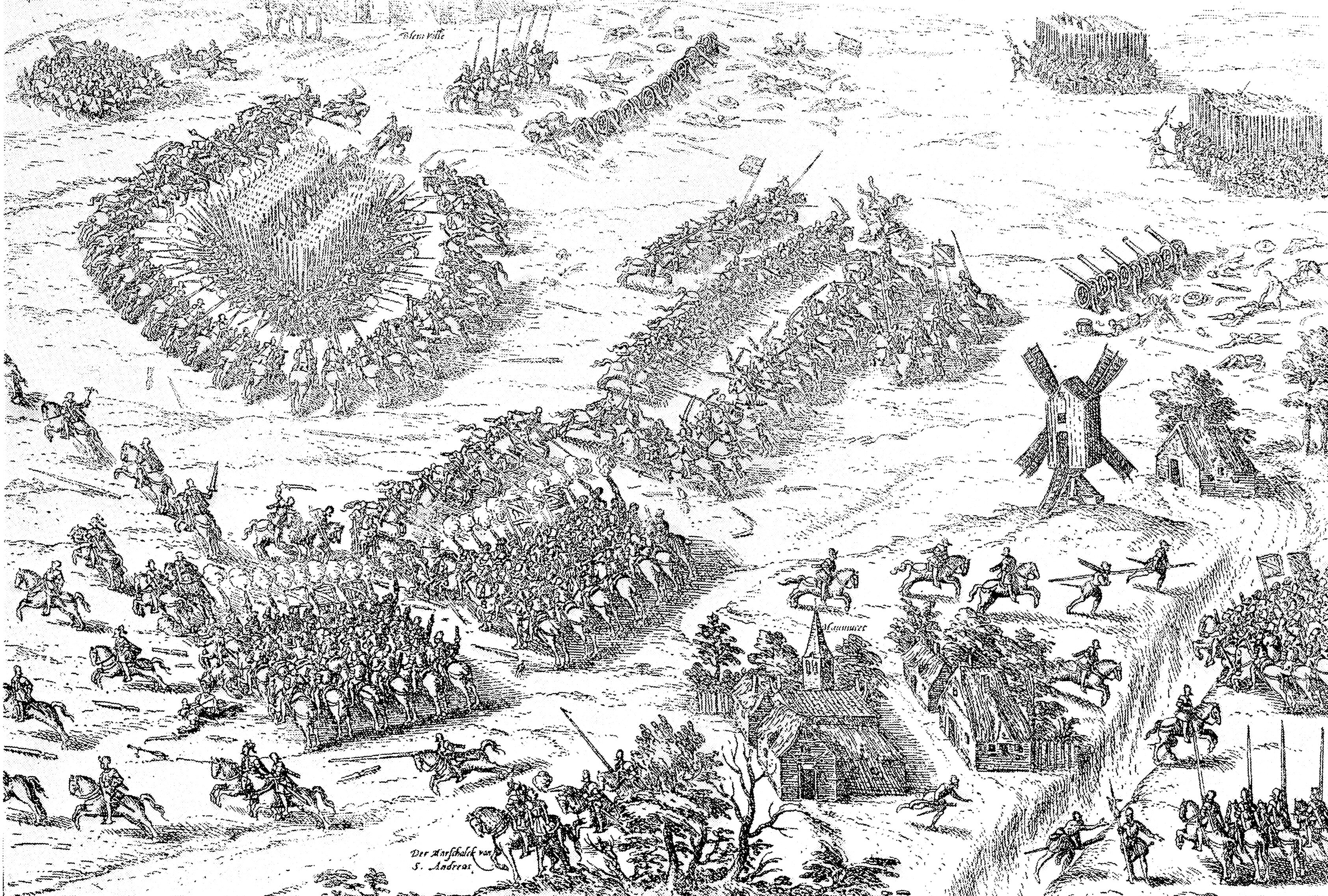 Schlacht_bei_Dreux_19_12_1562